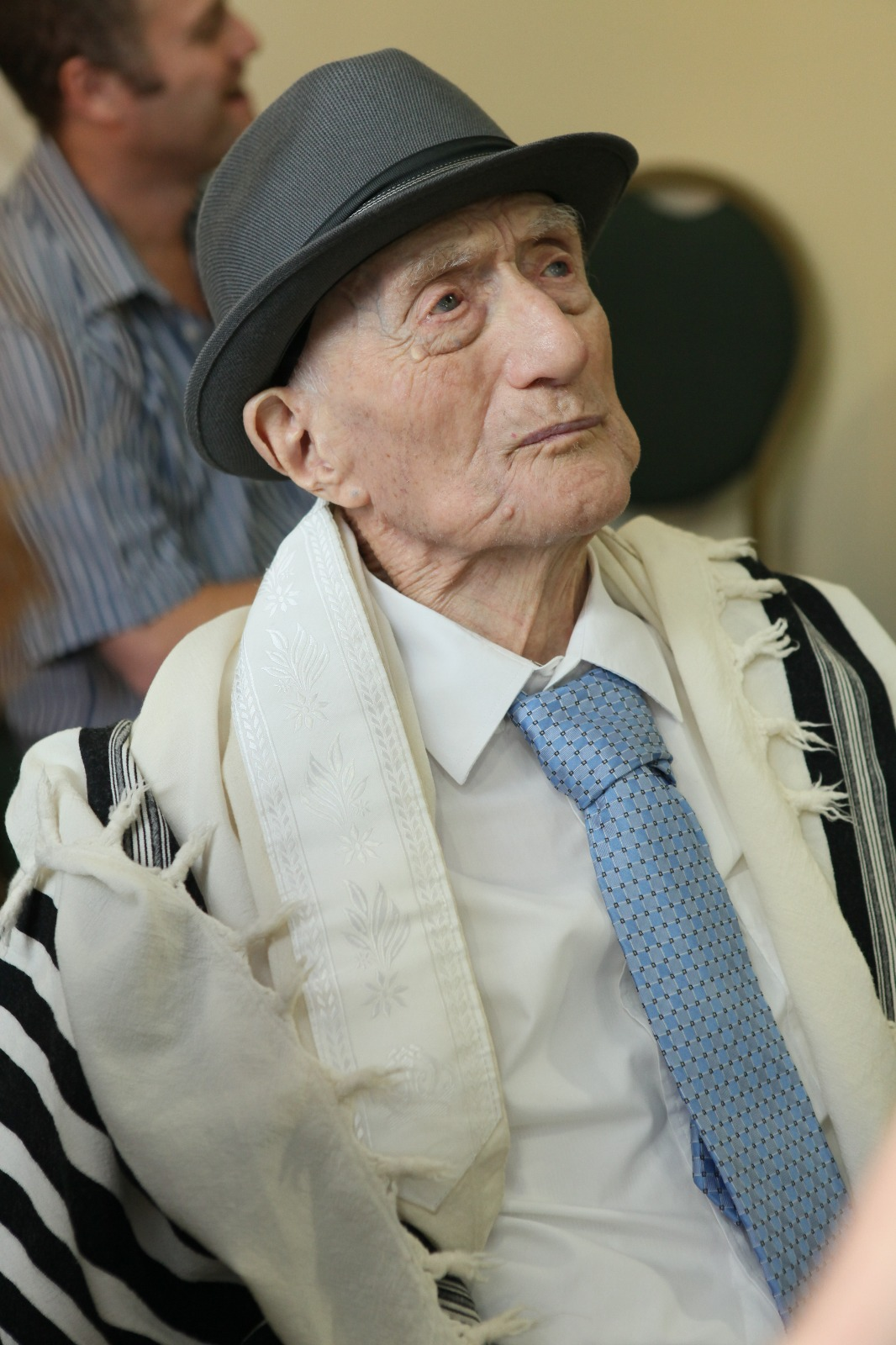 ישראל יצחק קרישְׂטל הוא ניצול השואה ויצרן ממתקים לשעבר, אשר הוכרז על ידי ספר השיאים של גינס, בהיותו בן 112, כגבר המבוגר ביותר החי בעולם. כיום (נכון לשנת 2017) הוא בן 113 שנים. בתמונה קרישטל חוגג בר מצווה באיחור